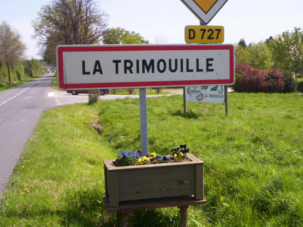 Panneau d'entrée ville La Trimouille